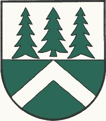 Wappen der Gemeinde Pusterwald